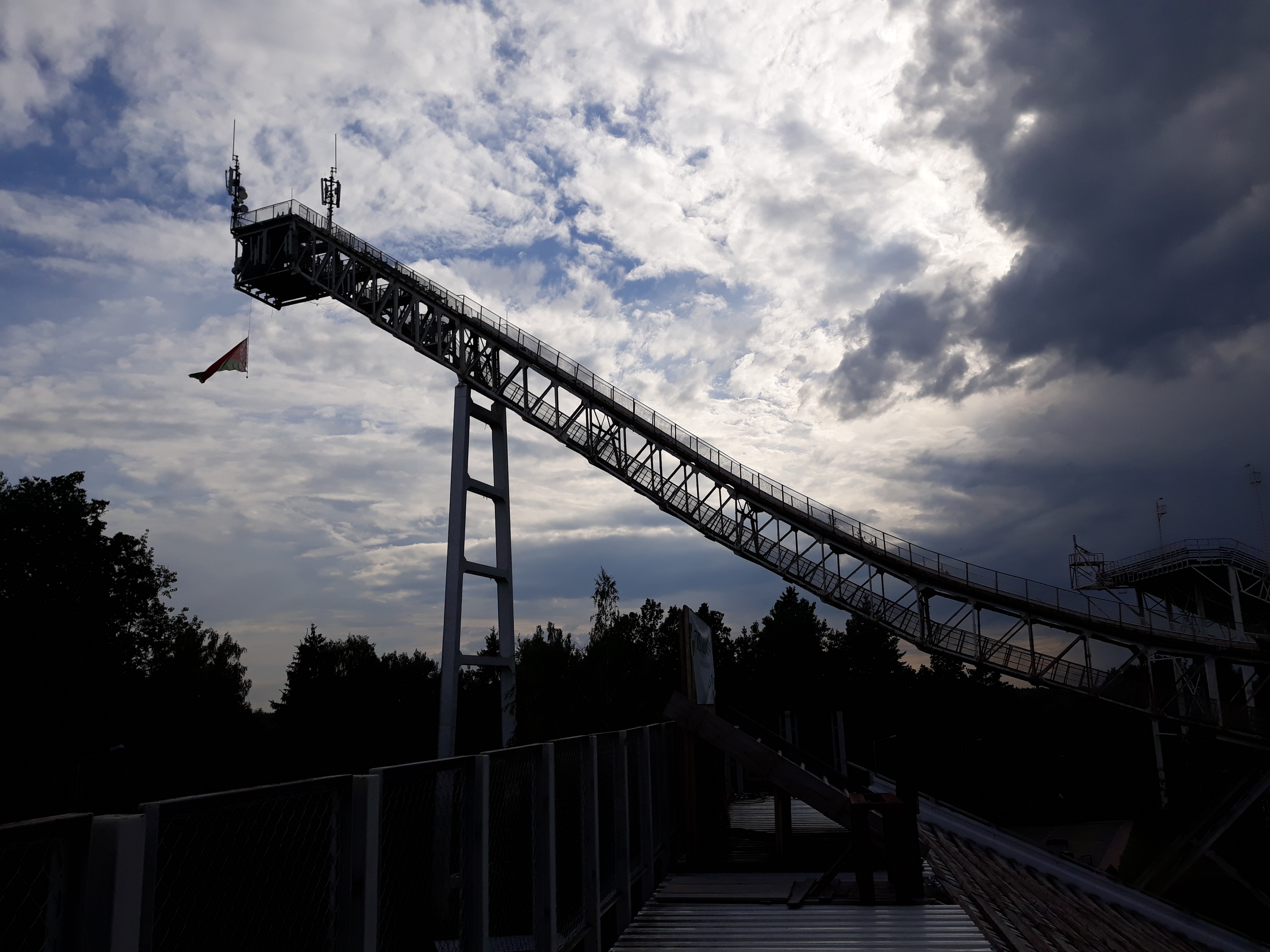 вёска Аколіца. Мінскі раён